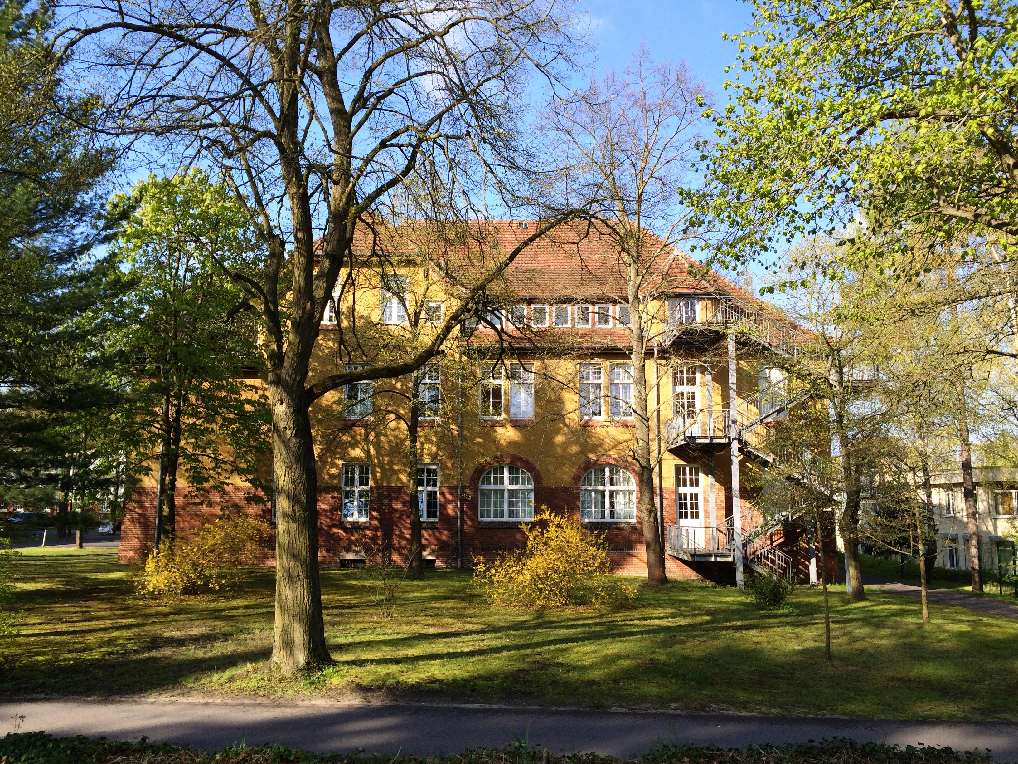 Denkmalgeschütztes Gebäude auf dem heutigen Asklepius Fachklinikum in Teupitz